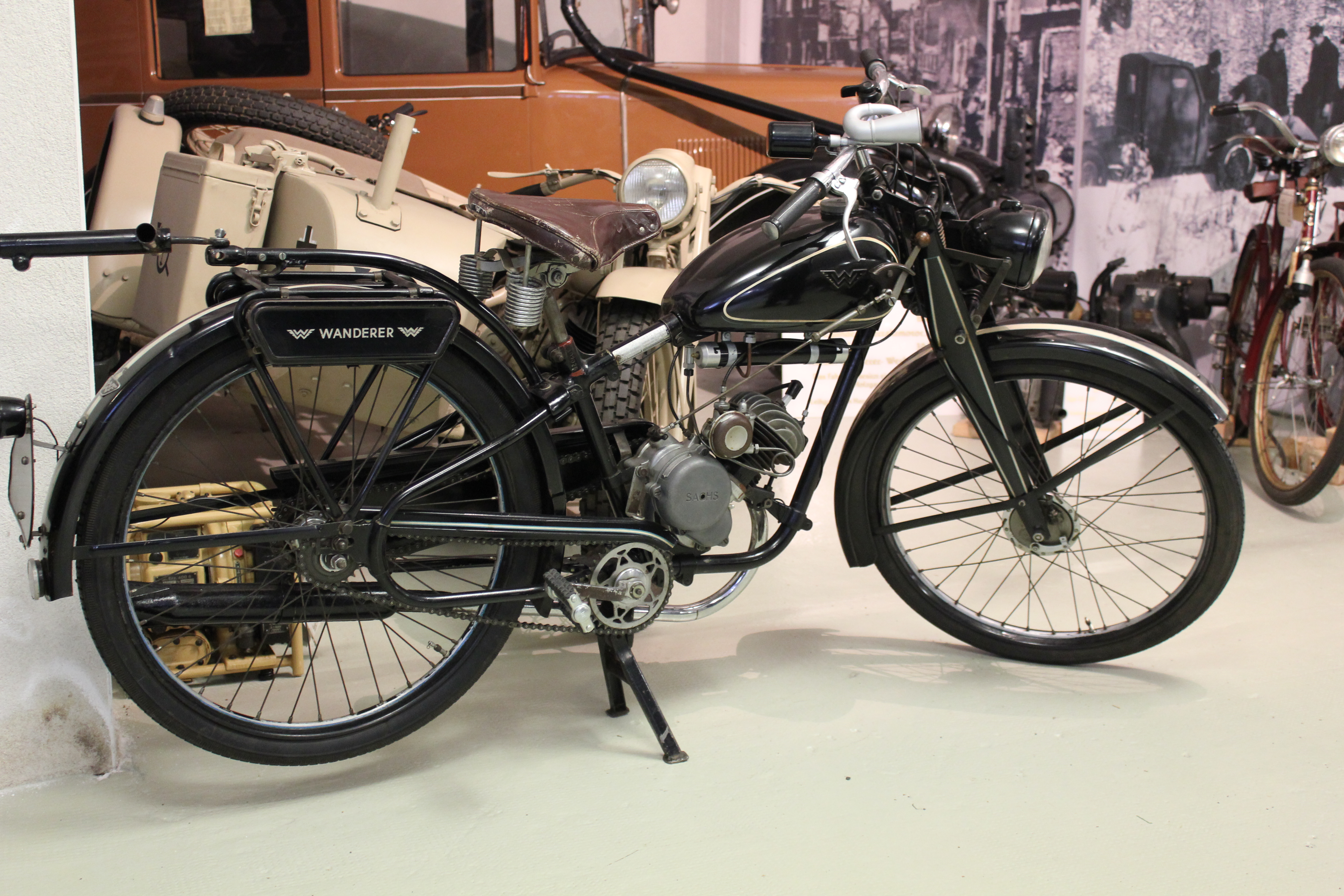 Wanderer Motorrad, Exponat des Museums für sächsische Fahrzeuge